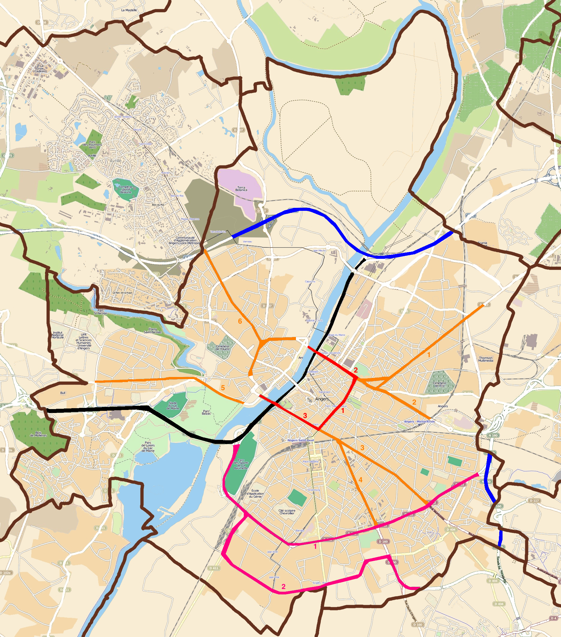 Voirie de la ville d'Angers : - En rouge, les boulevards historiques qui ceinturent l'hypercentre : 1.Boulevards du Maréchal-Foch, de la résistance et de la déportation, Bessonneau. 2. Boulevards Carnot, Ayrault. 3. Boulevards du Roi-René, du général De Gaulle. - En orange, les voies radiales en direction de la périphérie : 1. Avenue Pasteur. 2. Avenue Montaigne. 3. Rues Volney et Saumuroise. 4. Rue Rabelais, avenue De Lattre de Tassigny. 5. Avenue du Général Patton, boulevard du Bon Pasteur. 6. Avenue René-Gasnier, boulevards Davier et Georges Clémenceau. - En violet, les axes faisant office de rocade sud de substitution : 1. Boulevards Charles Barrangé, de l'Abbé Edouard Chauvat, Jacques Portet, Eugène Chaumin, Joseph Bédier, Jacques Millot, d'Estienne d'Orves. 2. Boulevard Charles Barrangé, route de Bouchemaine, boulevards Robert d'Arbrissel, Albert Blanchoin, RN260. - En noir, les voies sur berges ; - En bleu, les autoroutes.